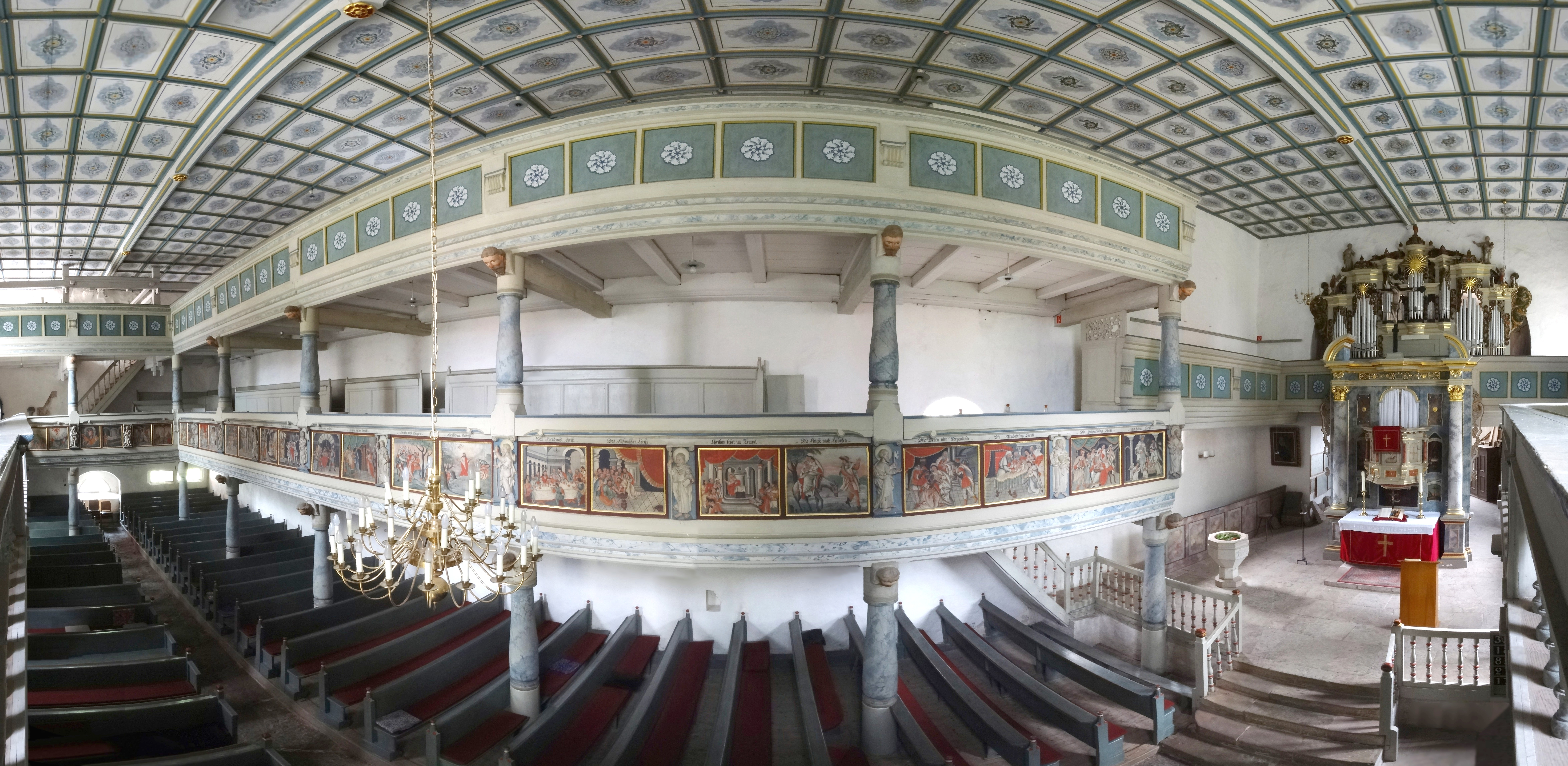 Innenraumpanorama